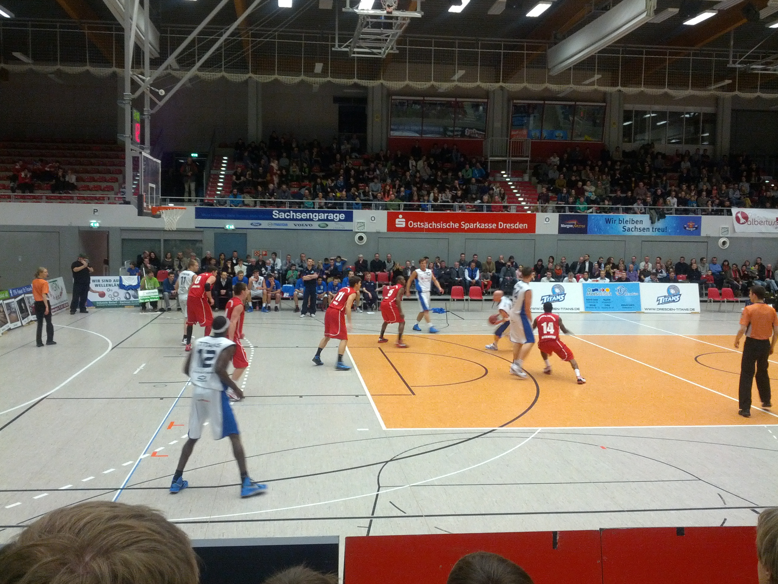 Basketballspiel zwischen den Dresden Titans und der BG Leitershofen/Stadtbergen in der Margon Arena in Dresden